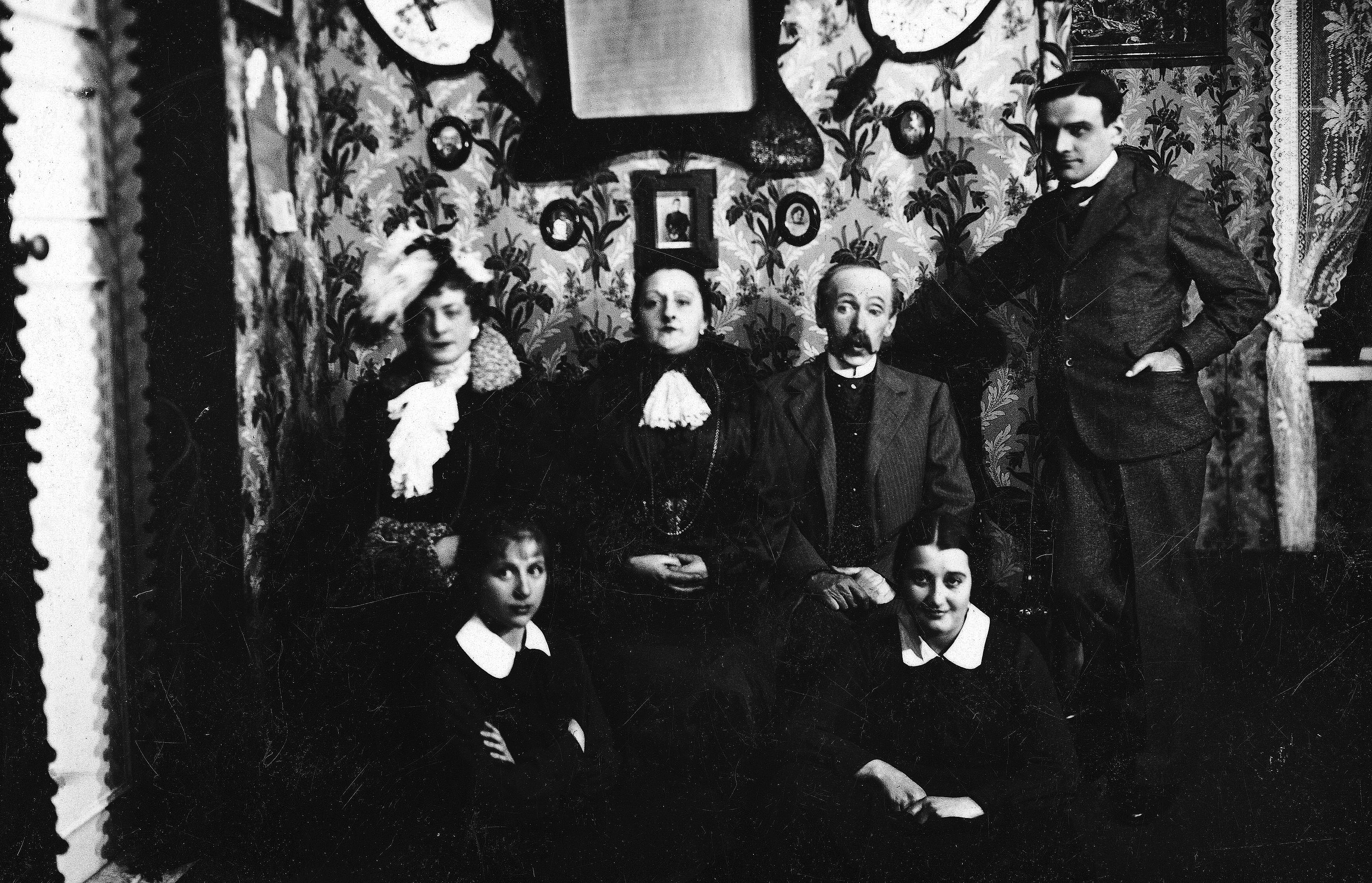 Przedstawienie "Moralność Pani Dulskiej" Gabrieli Zapolskiej w Teatrze Miejskim w Wilnie. Scena zbiorowa. Siedzą na pierwszym planie od lewej: Stefania Gintel i Halina Motyczyńska. Siedzą na drugim planie od lewej: Hilda Skrzydłowska, Irena Jasińska - Detkowska jako Dulska, Władysław Neubelt jako Dulski. Stoi Wacław Ścibor.